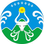 Герб Оймяконского улуса Якутии